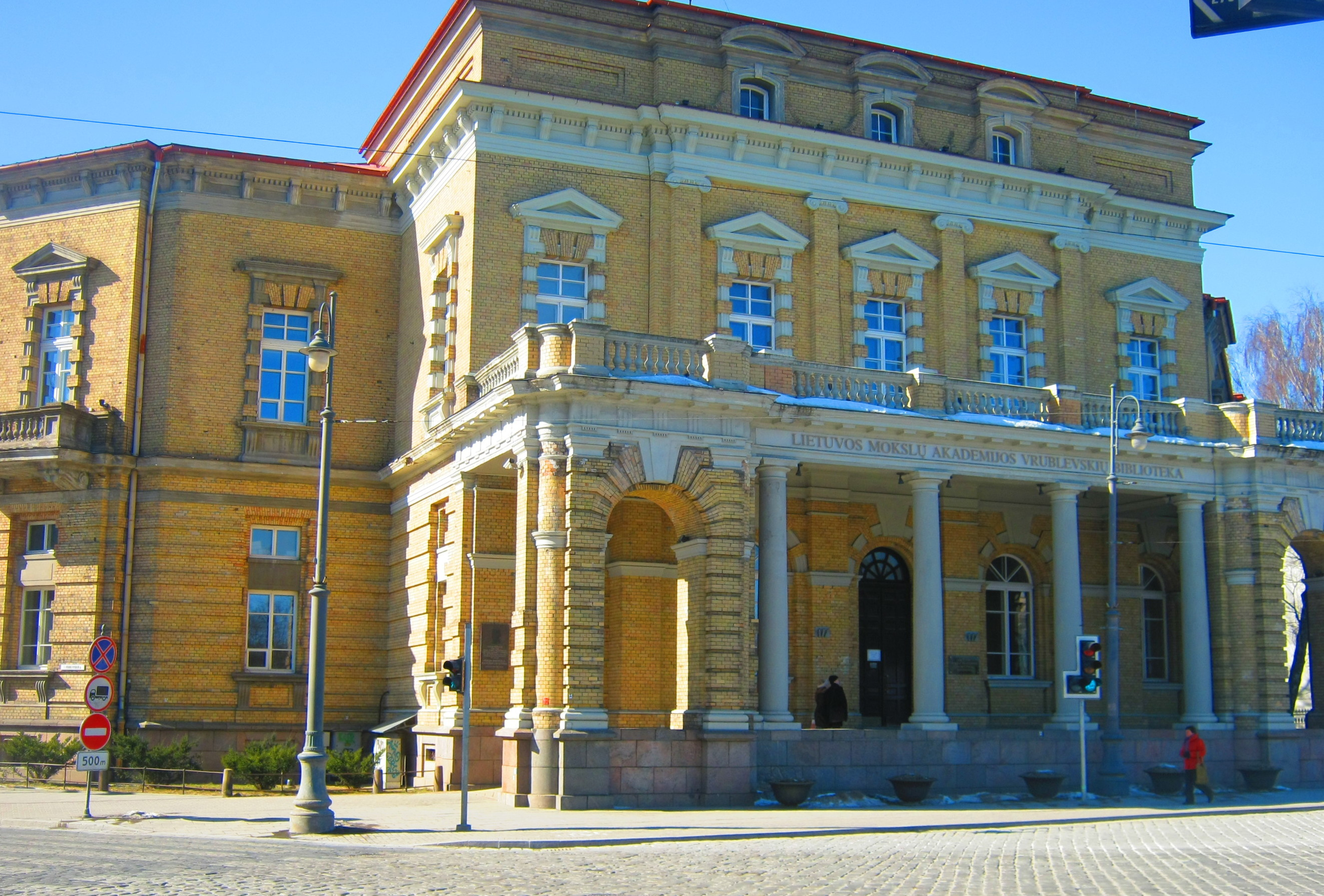 Lietuvos mokslų akademijos Vrublevskių biblioteka, Vilnius